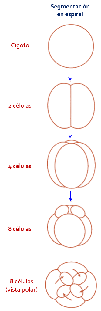 Segmentación en espiral